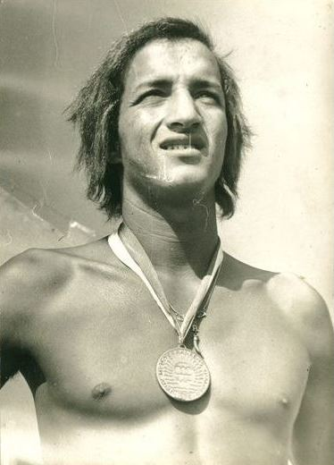 Le nageur Ali Gharbi dans les années 70